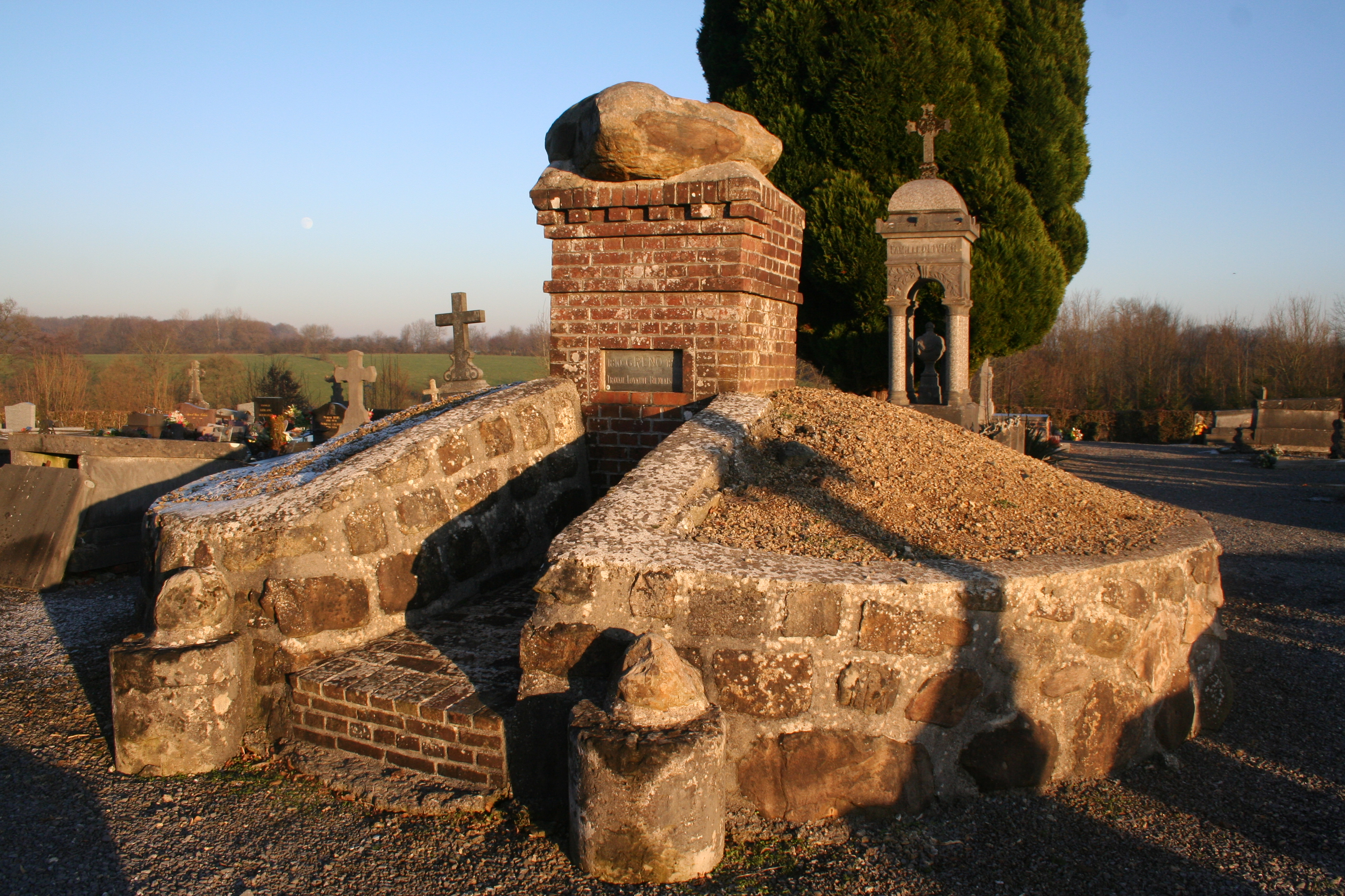 Narcisse Greno's graveyard, in Landouzy-la-ville, France